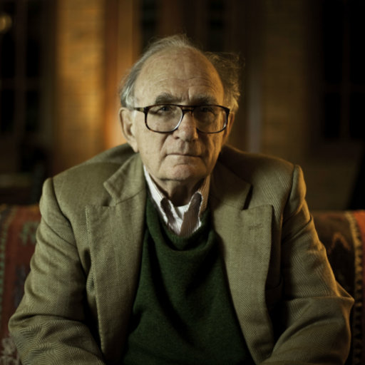 Foto tirada de Norman Gall no Instituto Braudel.